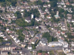 Das Zentrum von Kaldauen (2003): Unten befindet sich das neue Zentrum, links befindet sich die katholische Liebfrauenkirche, rechts die protestantische Friedenskirche.